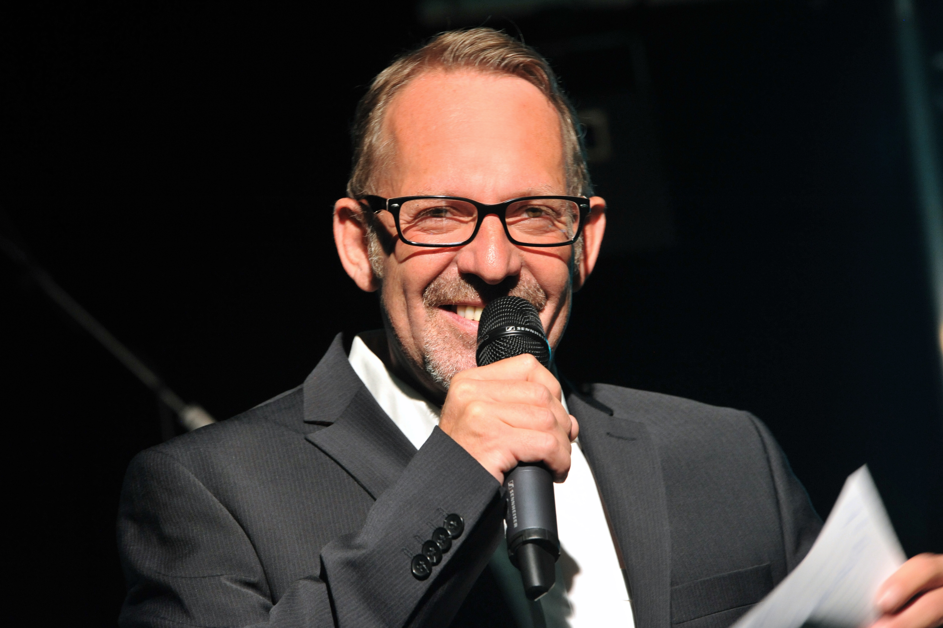 Moderator